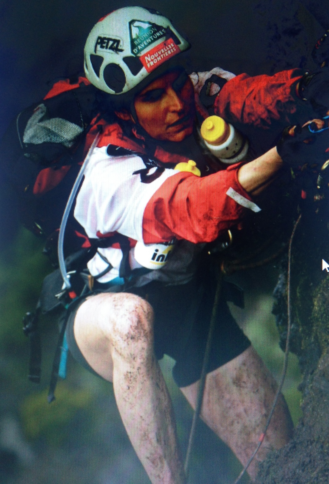 Karine Baillet Réunion d'Aventures